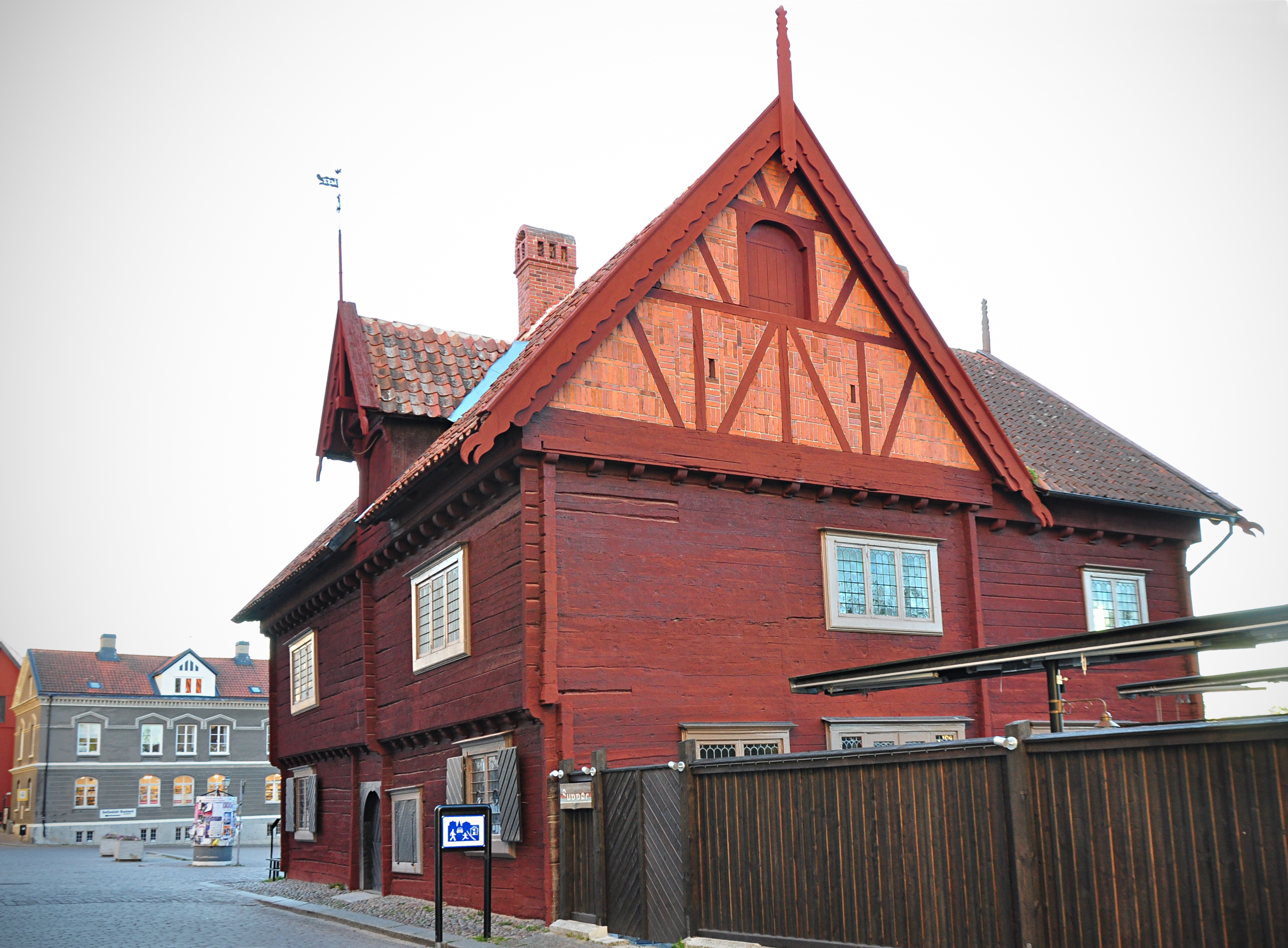 Burmeisterska huset sedd från Strandgatan, Visby. Burmeister 4.